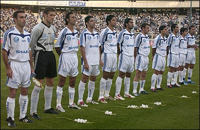 Saba Battery 1 - 1 Esteghlal